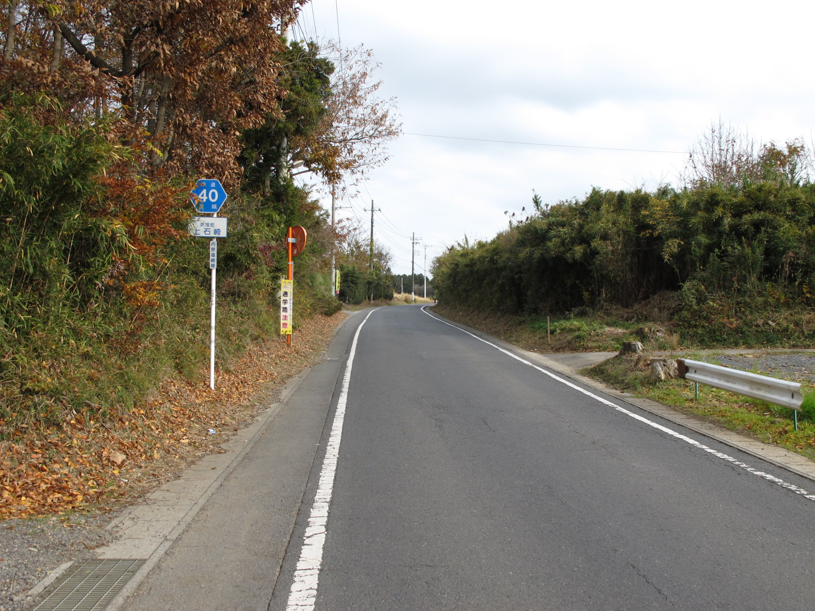 茨城県道４０号内原塩崎線（茨城町上石崎）